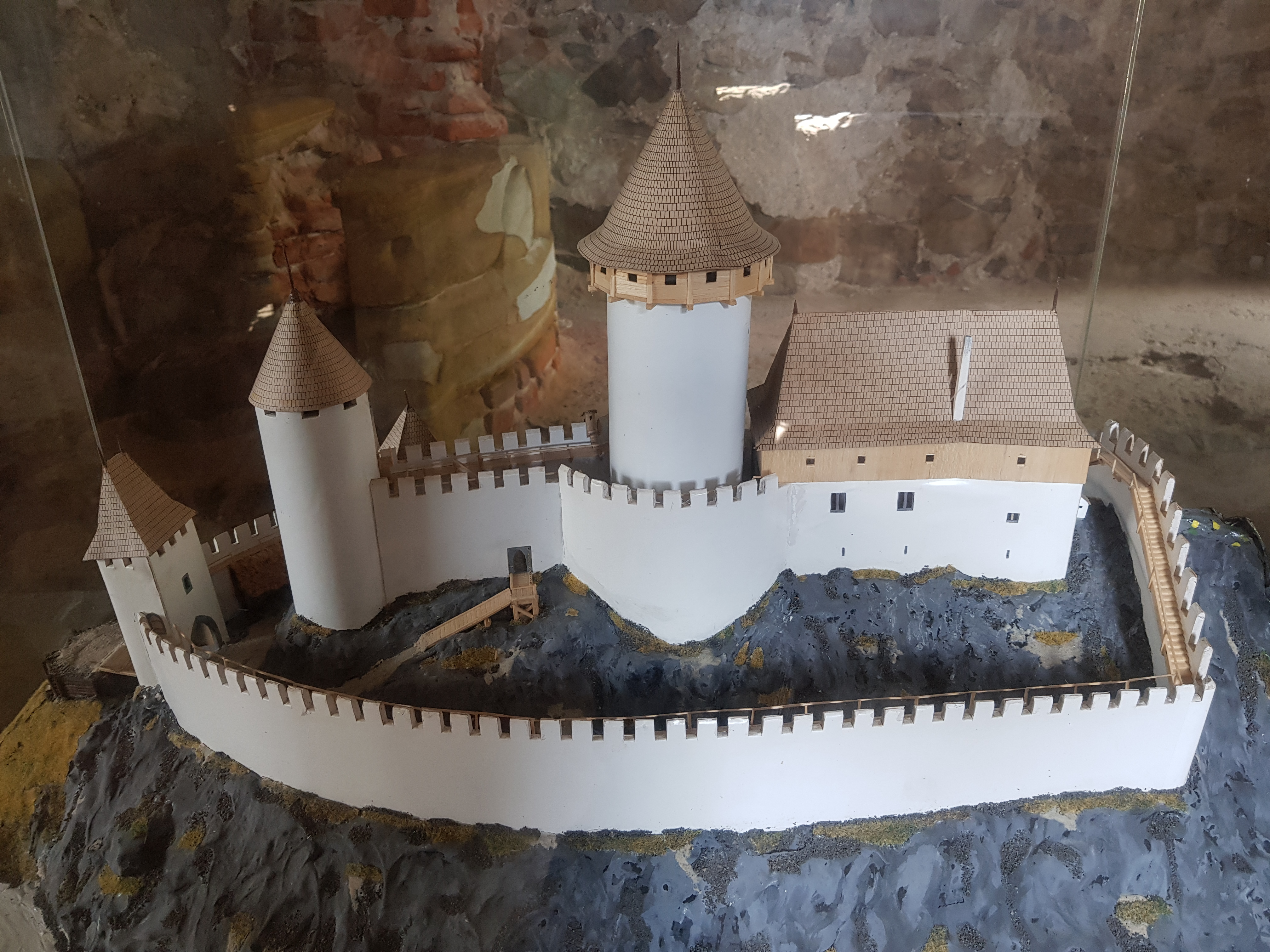 Zřícenina hradu Žebrák, model